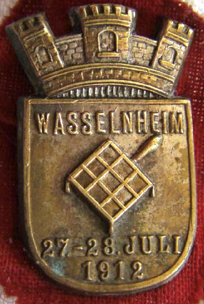 Wasselonne, Wasselnheim en 1912, épinglette aux armes de la ville.